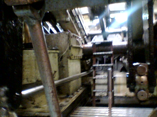 Ship steam engine Skibladner